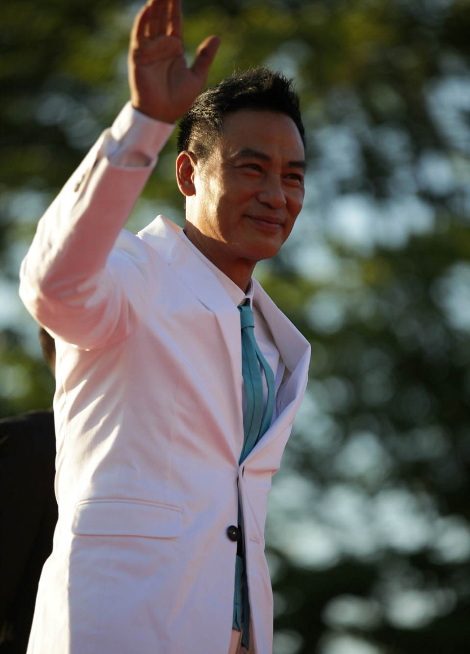 제19회 부천국제판타스틱영화제 레드카펫 part.3